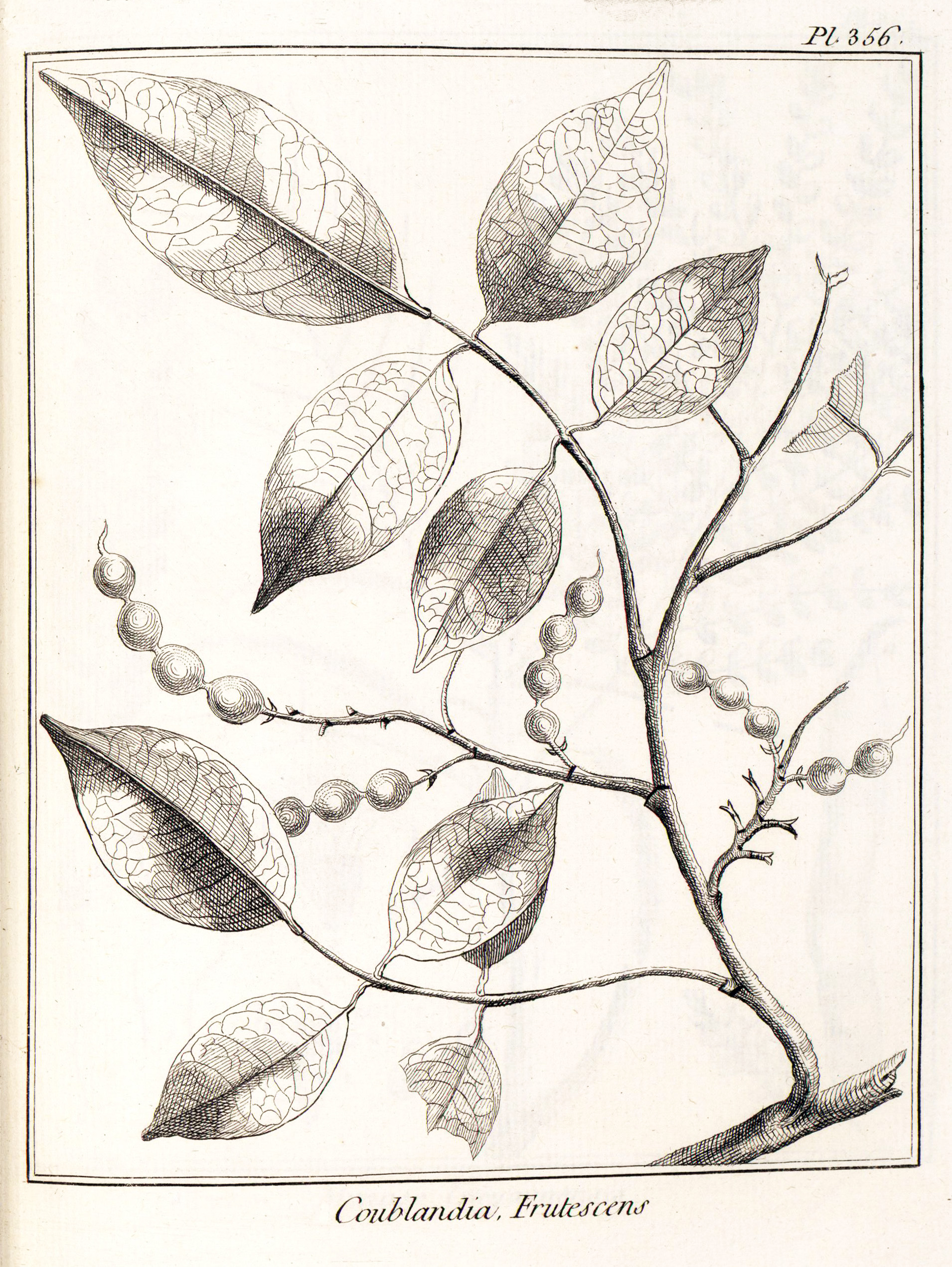 Gravure à l’eau forte planche n°356 « Histoire des plantes de la Guiane Françoise » 1775, de Jean Baptiste Christophe Fusée-Aublet.